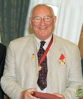 МОСКВА, КРЕМЛЬ. Церемония вручения Государственных премий в области литературы и искусства за 1999 год. Государственная премия вручается оператору-постановщику Павлу Лебешеву.